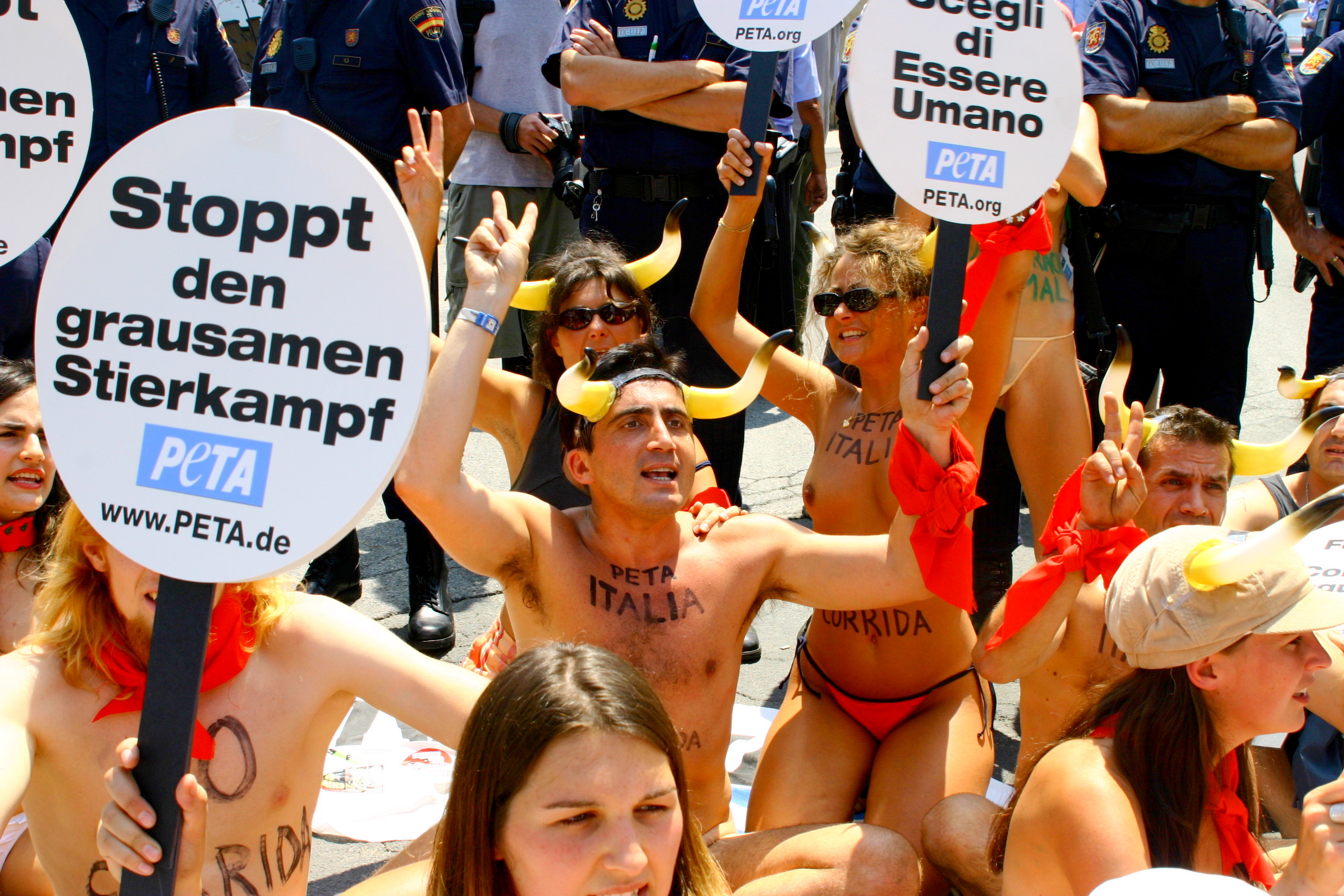 Manifestantes antitaurinos italianos e alemanes en Pamplona, España.